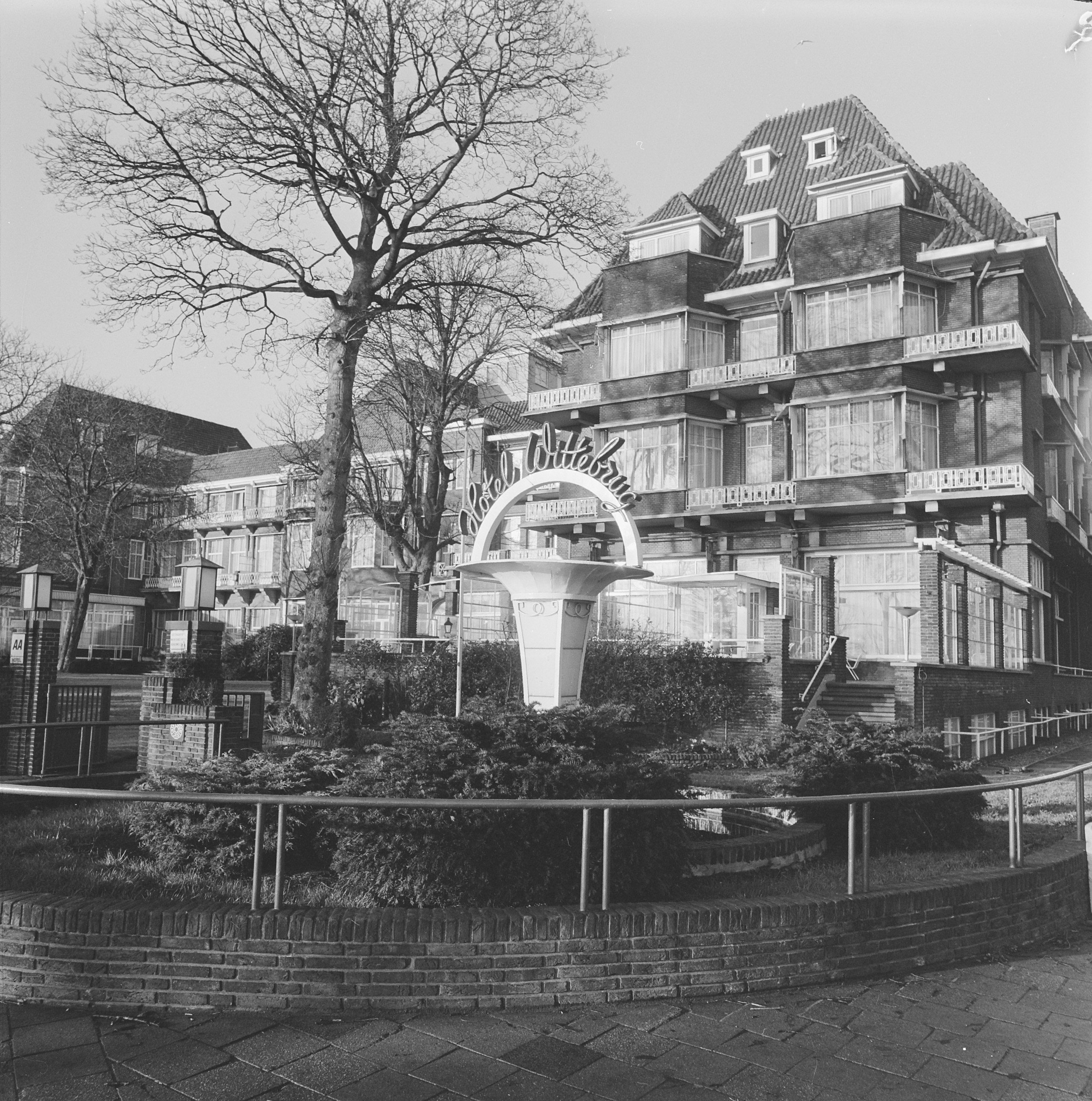 Collectie / Archief : Fotocollectie Anefo Reportage / Serie : [ onbekend ] Beschrijving : Hotel Wittebrug in Den Haag gesloten, exterieur Datum : 18 november 1972 Locatie : Den Haag, Zuid-Holland Trefwoorden : hotels Instellingsnaam : Wittebrug Fotograaf : Evers, Joost / Anefo Auteursrechthebbende : Nationaal Archief Materiaalsoort : Negatief (zwart/wit) Nummer archiefinventaris : bekijk toegang 2.24.01.03 Bestanddeelnummer : 926-0337